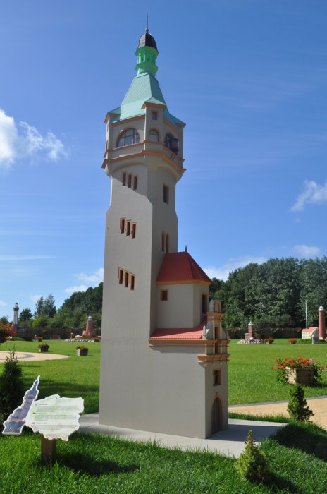 Latarnia Sopot miniatura